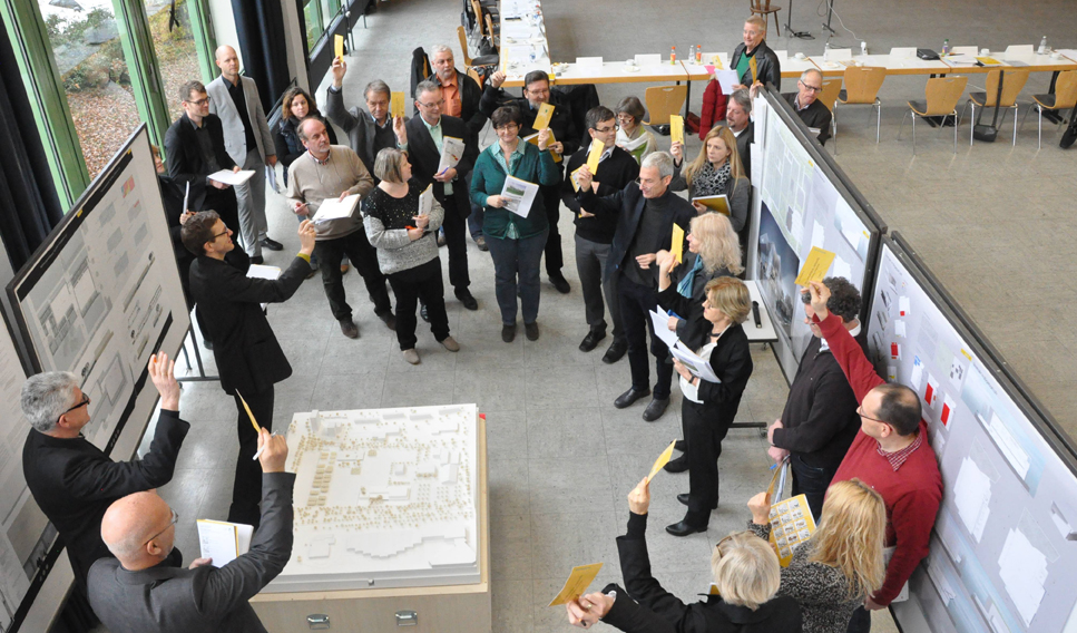 Moderation einer Preisgerichtssitzung